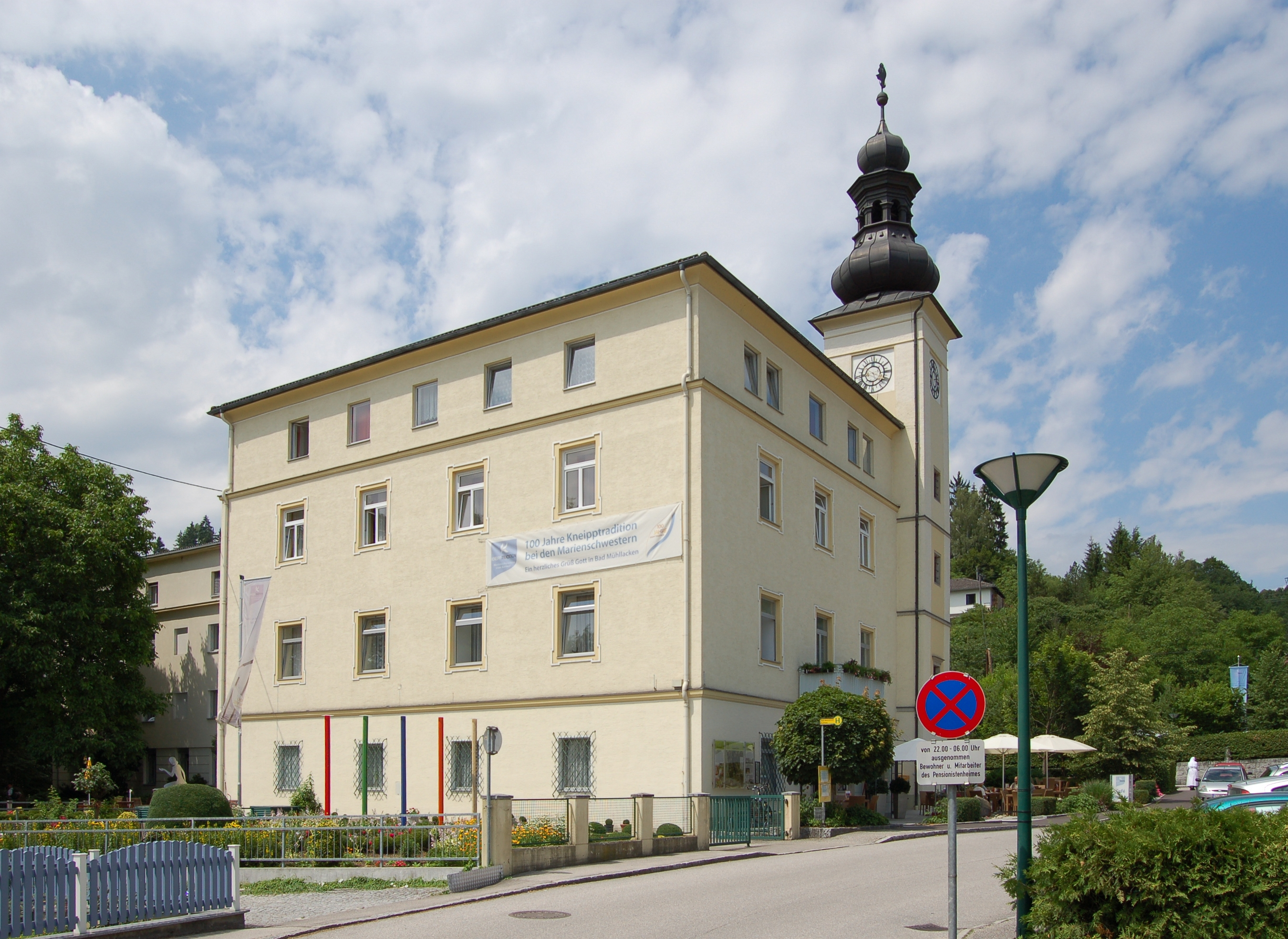 Die Kneipp-Kuranstalt in Bad Mühllacken (Bad Mühllacken 55), Gemeinde Feldkirchen an der Donau.